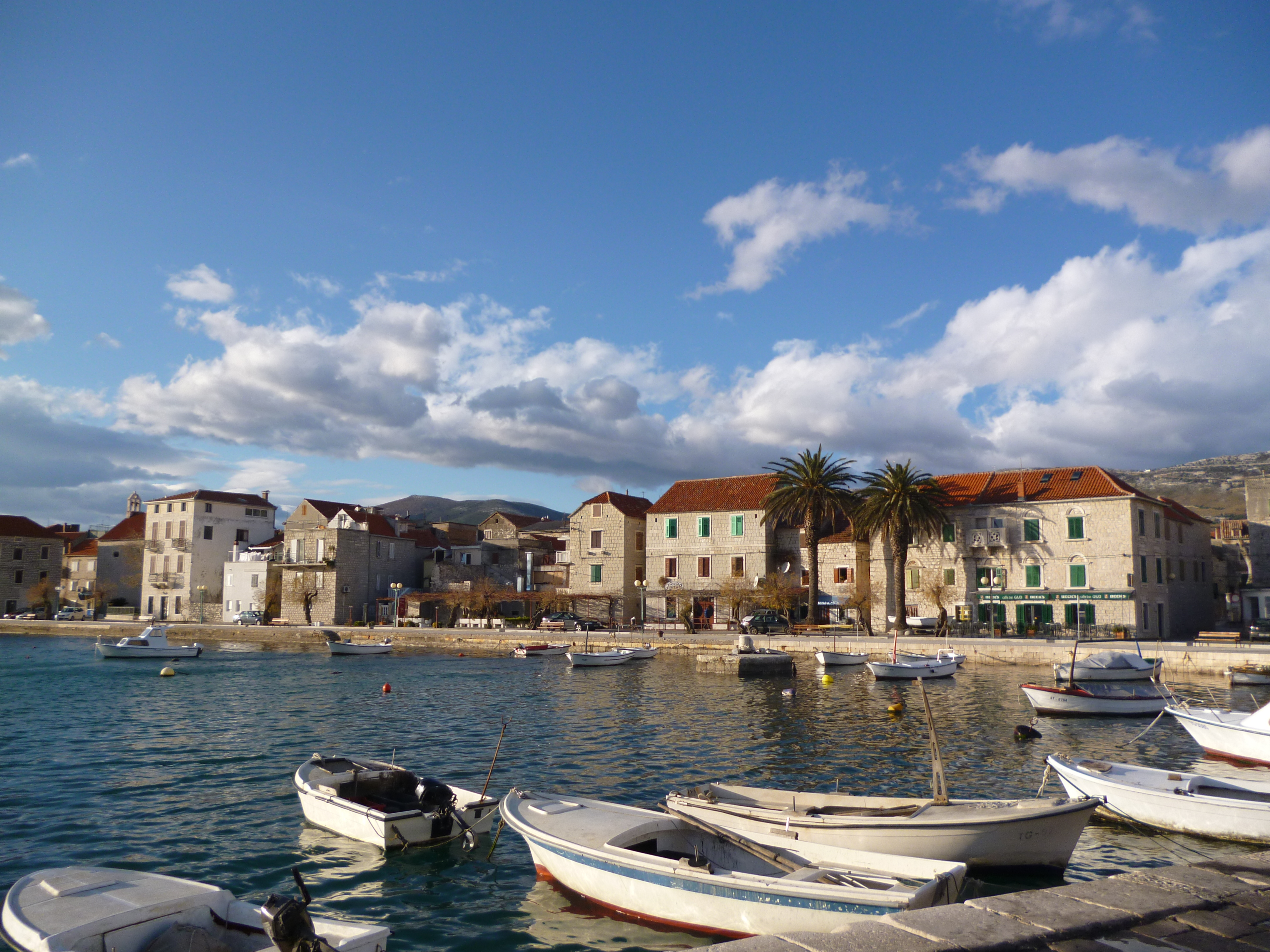 pogled s juga